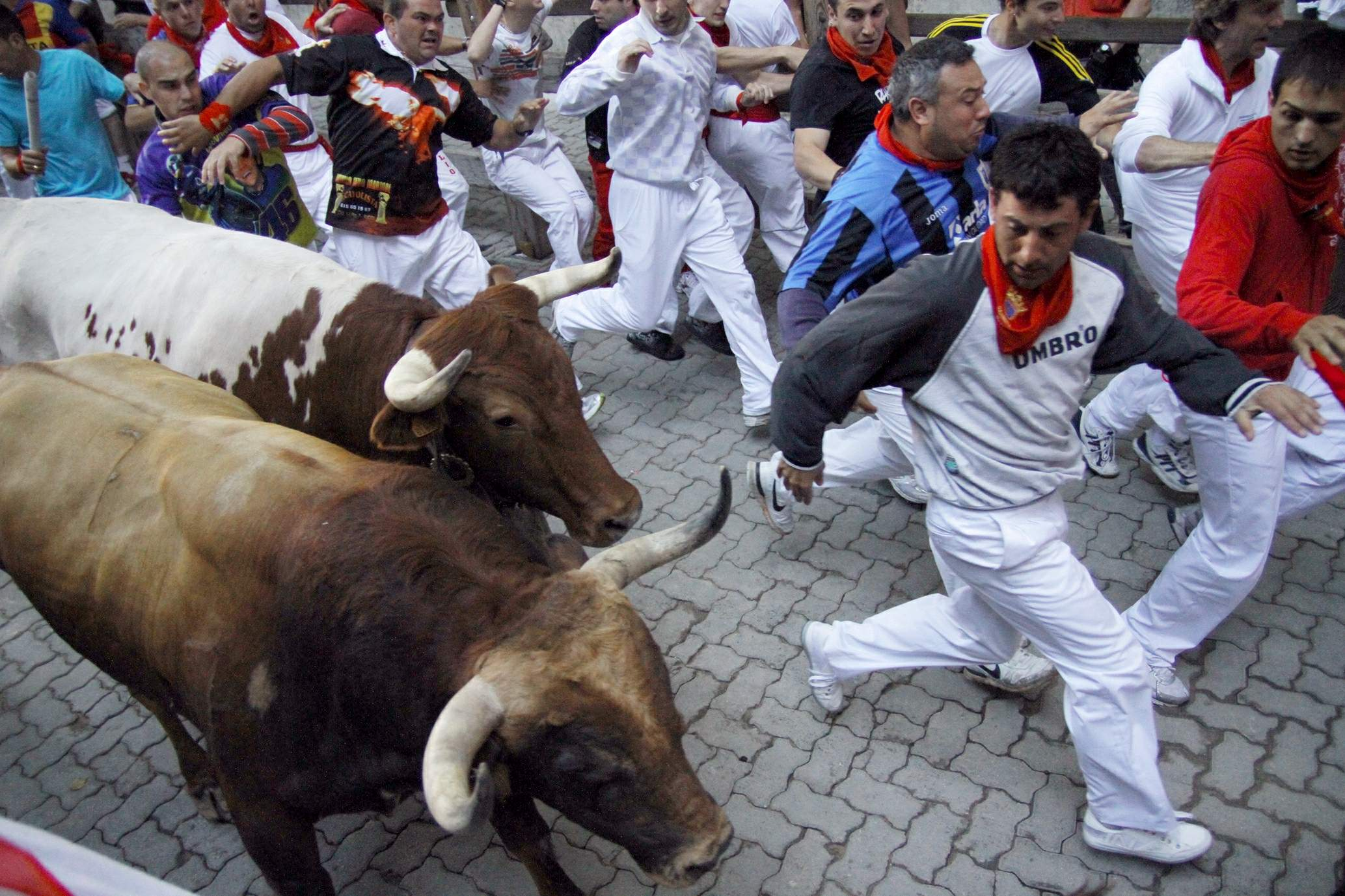 Encierro del10 de julio